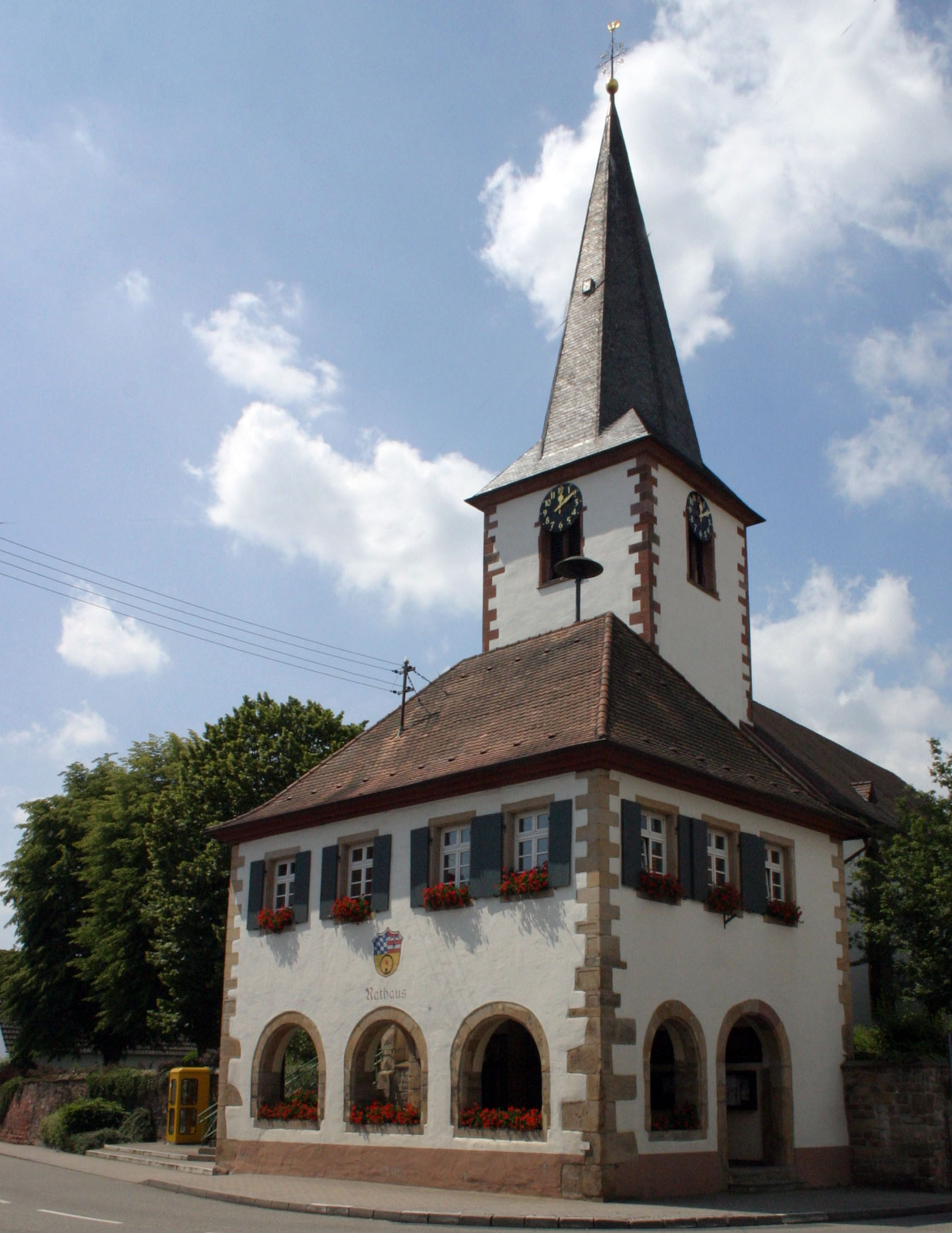 Ottersheim, Germersheimer Straße 3; Katholische Pfarrkirche St. Martin; fünfachsiger Saalbau, 1618, 1789 erweitert, gotischer ehemaliger Chorturm; Sandsteinkruzifix über Adam und Eva, bezeichnet 1747. Ottersheim, Germersheimer Straße 1; Rathaus, Walmdachbau, Erdgeschosshalle bezeichnet 1555, Obergeschoss wohl aus dem 18. Jahrhundert.